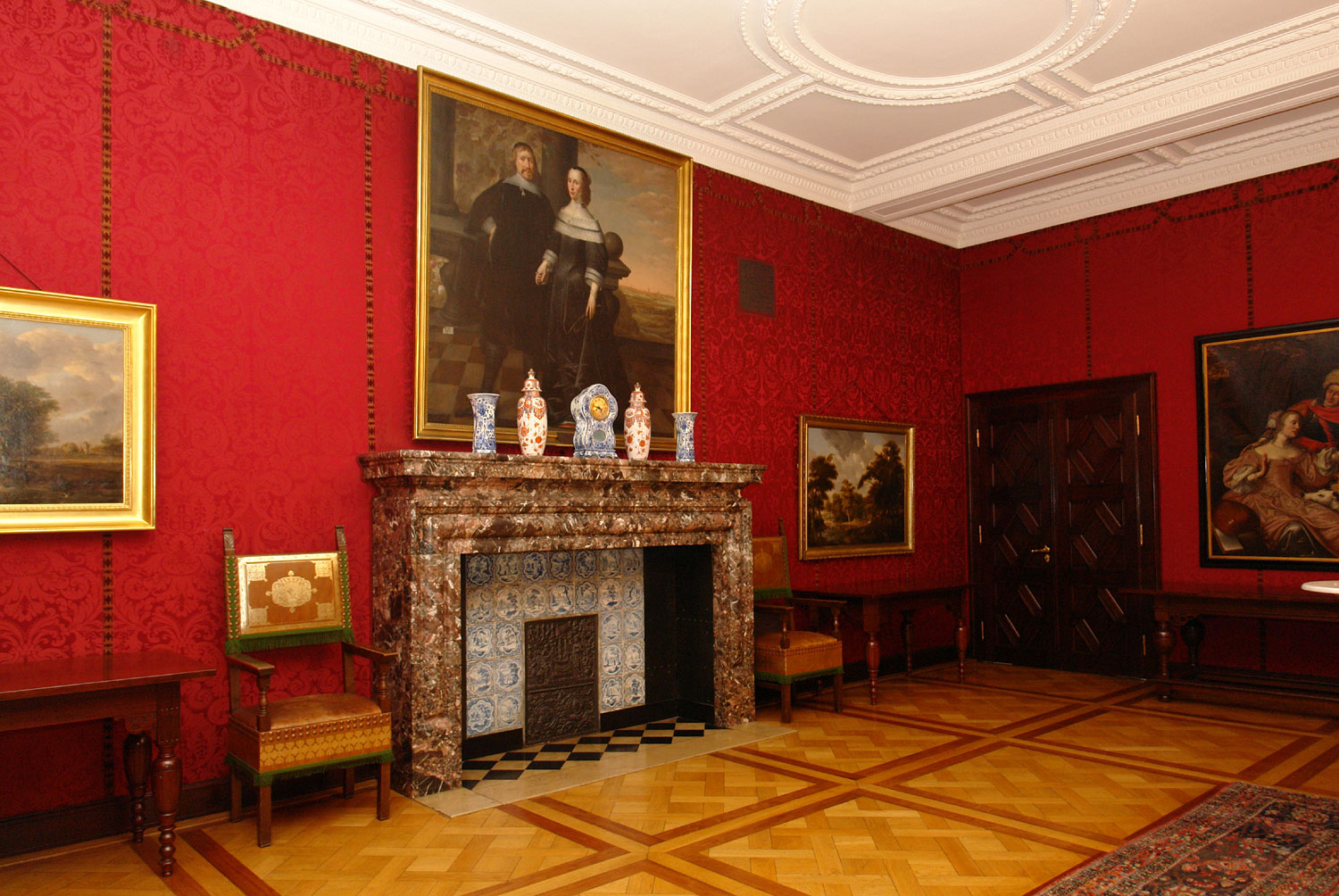 Rathaus in Bremen. Kaminsaal im Neuen Rathaus.